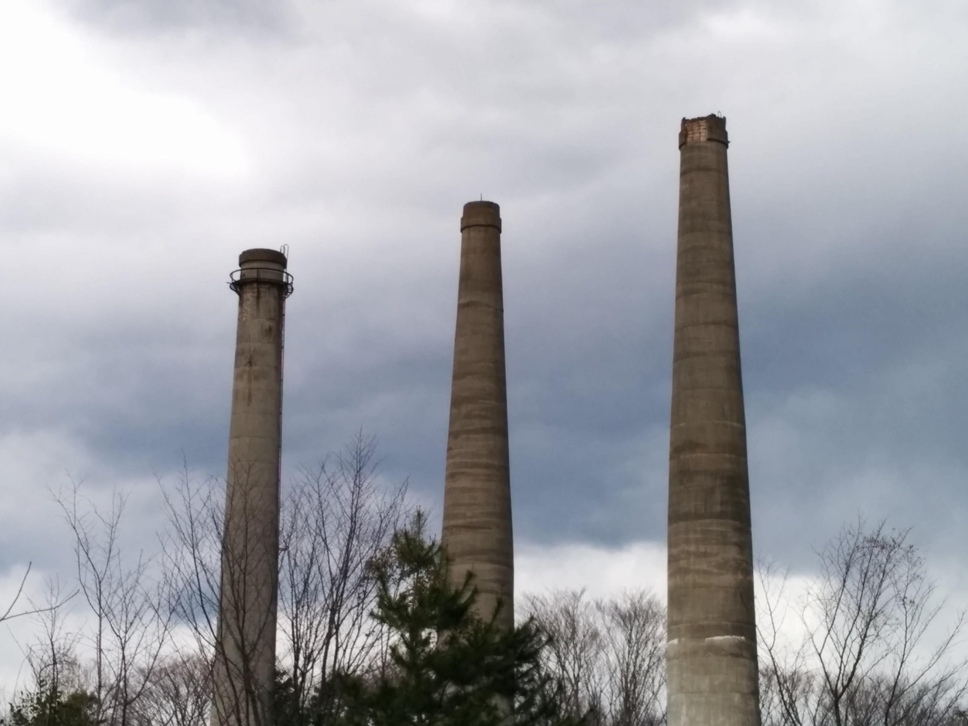 立川三本煙突